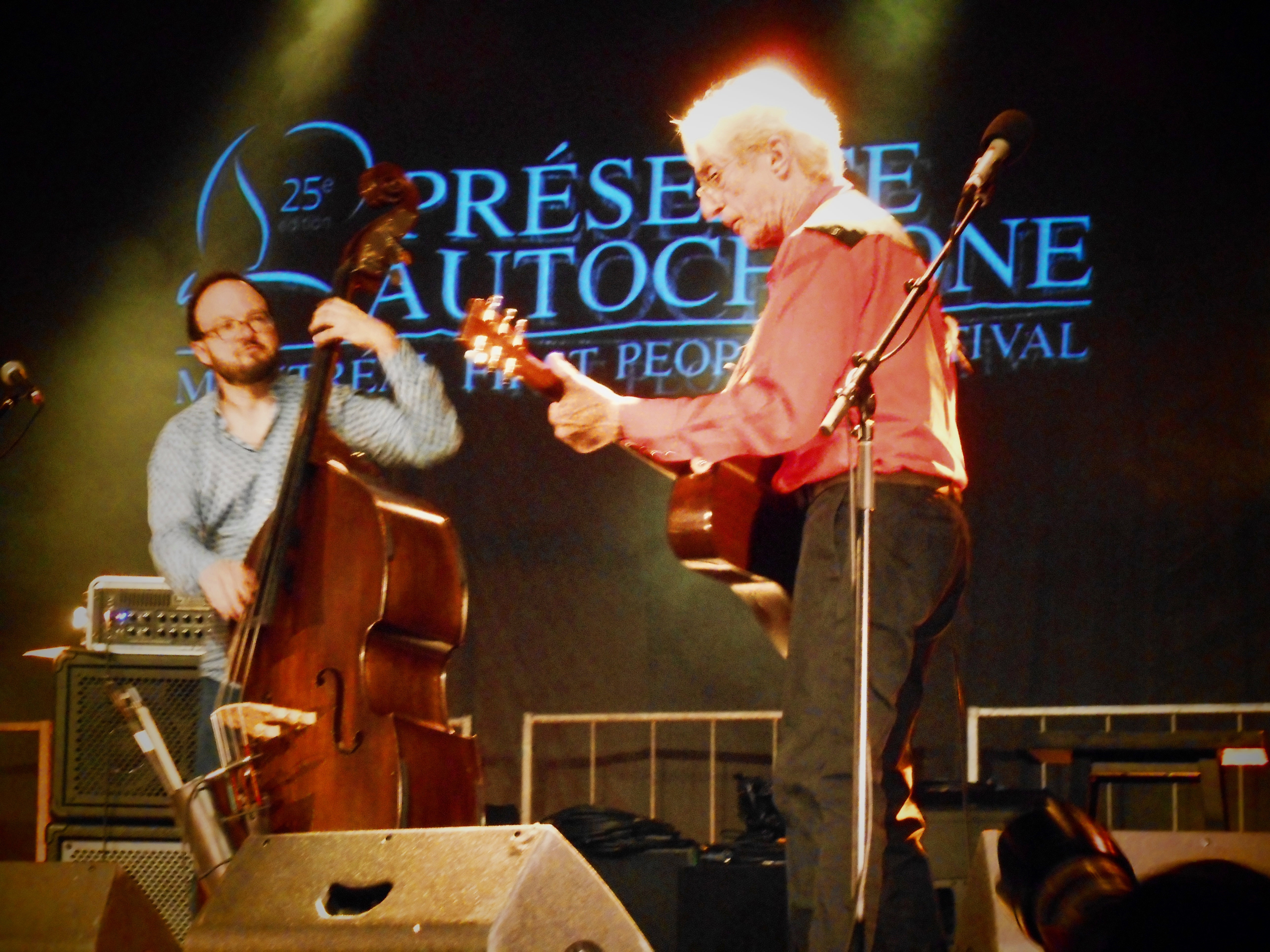 Richard Desjardins a offert une performance à Montréal, le 31 juillet 2015, dans le cadre du 25e anniversaire du festival Présence autochtone.